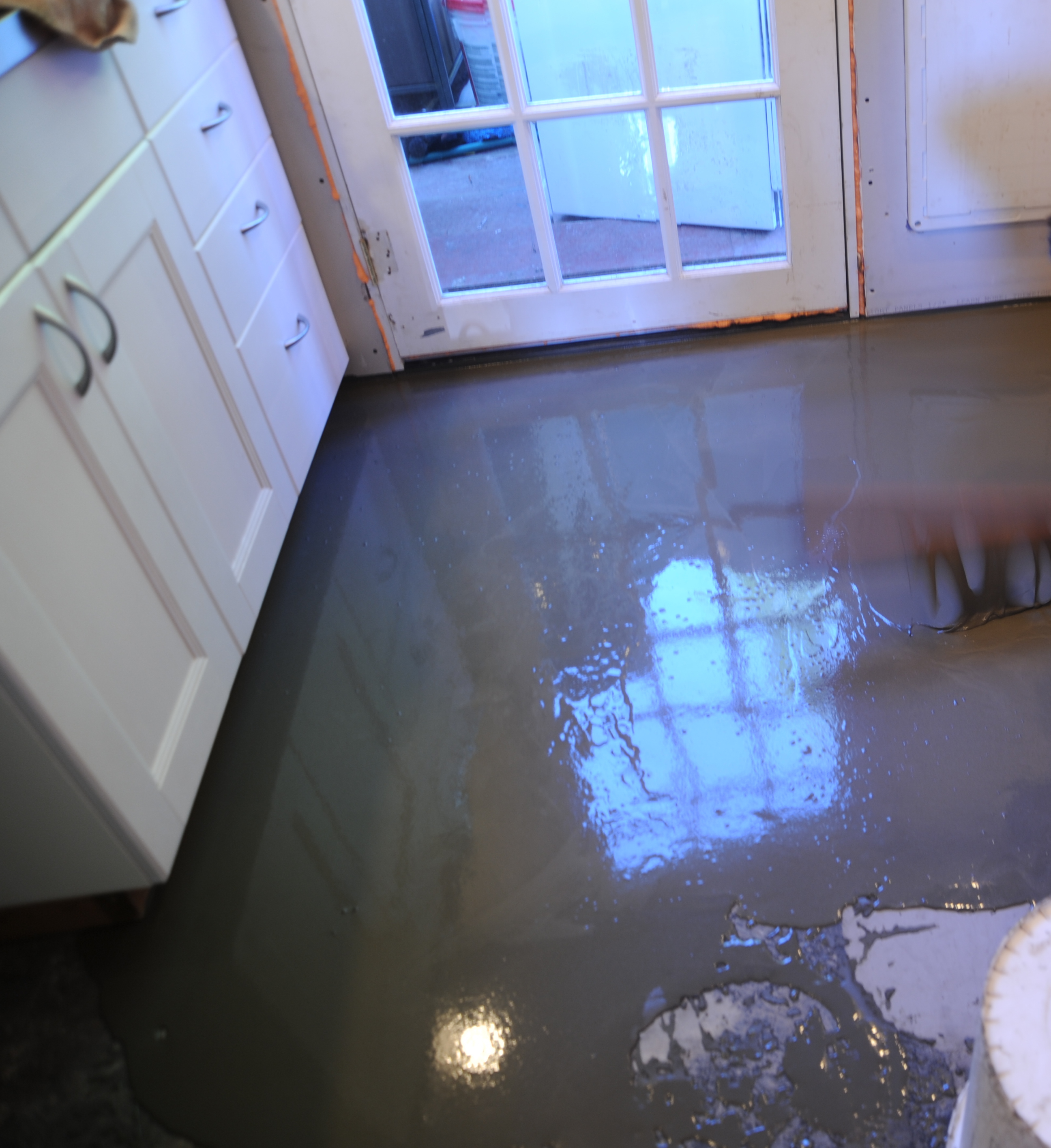 Self-leveling concrete over a kitchen floor before tiling.